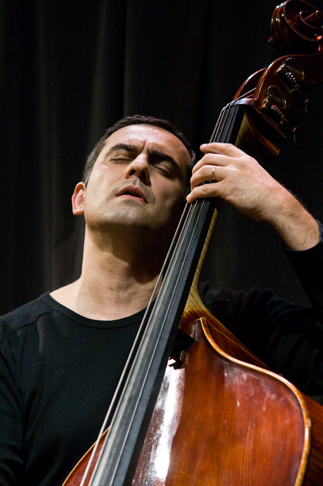 Claude Tchamitchian en concert au Studio de l'Ermitage (Paris, 20ème) en trio avec Andy Emler et Eric Echampard, le 11 avril 2008.